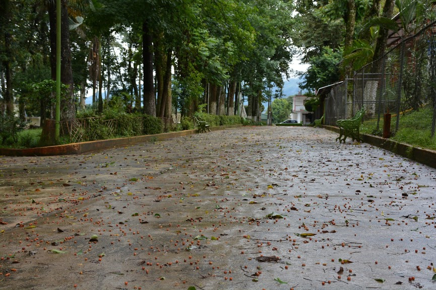 El parque recreativo mas importante